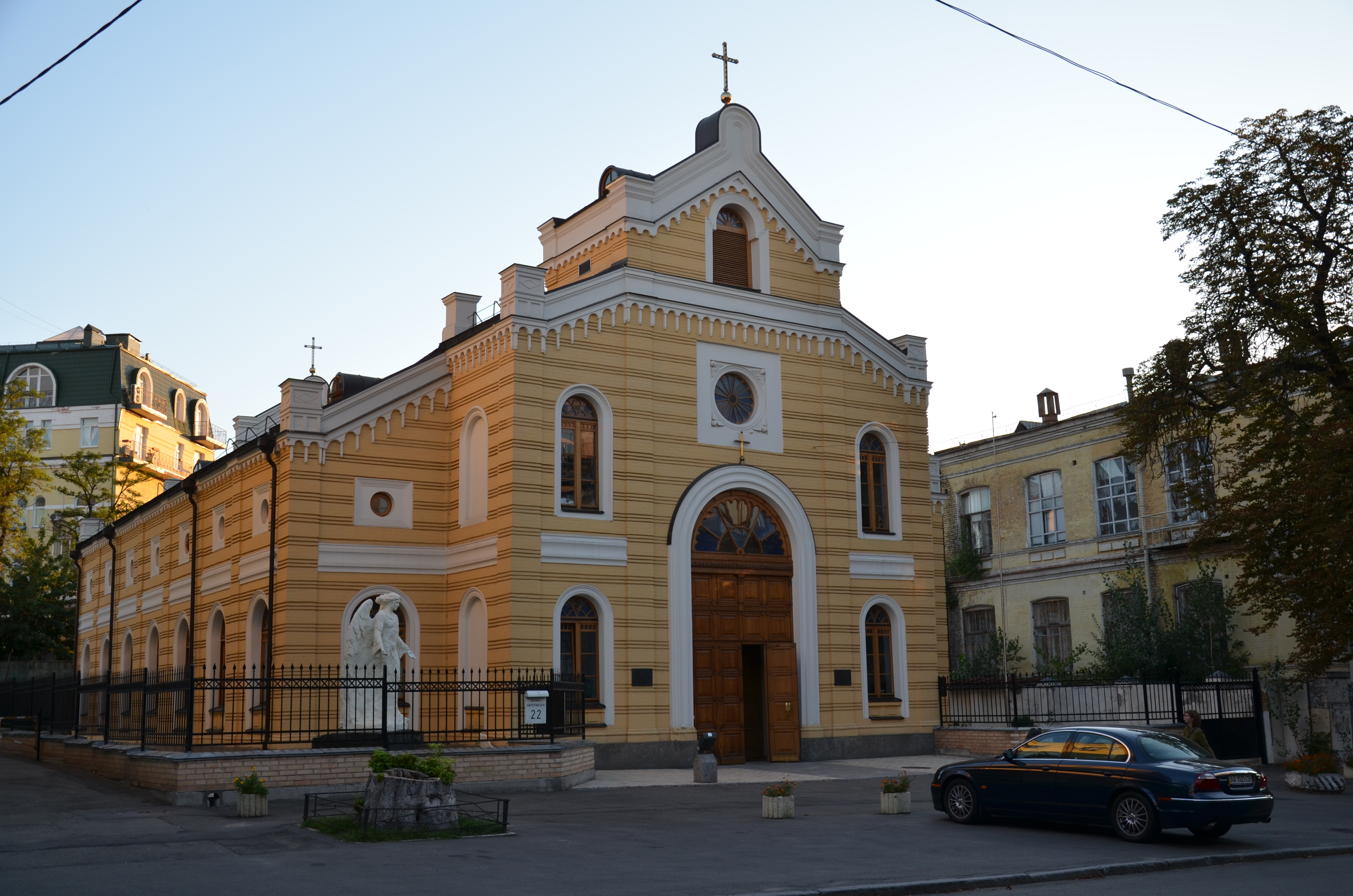 Лютеранська євангелістська кірха, Київ, Лютеранська вул., 22